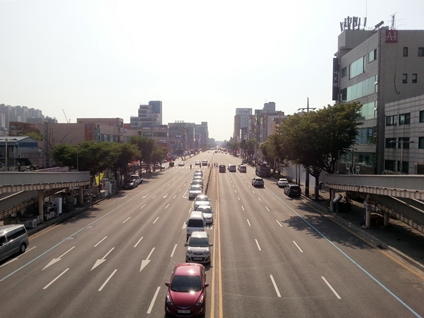 인주대로와 문화서로가 교차하는 곳의 육교 위에서 찍은 사진. 서쪽 방향으로.